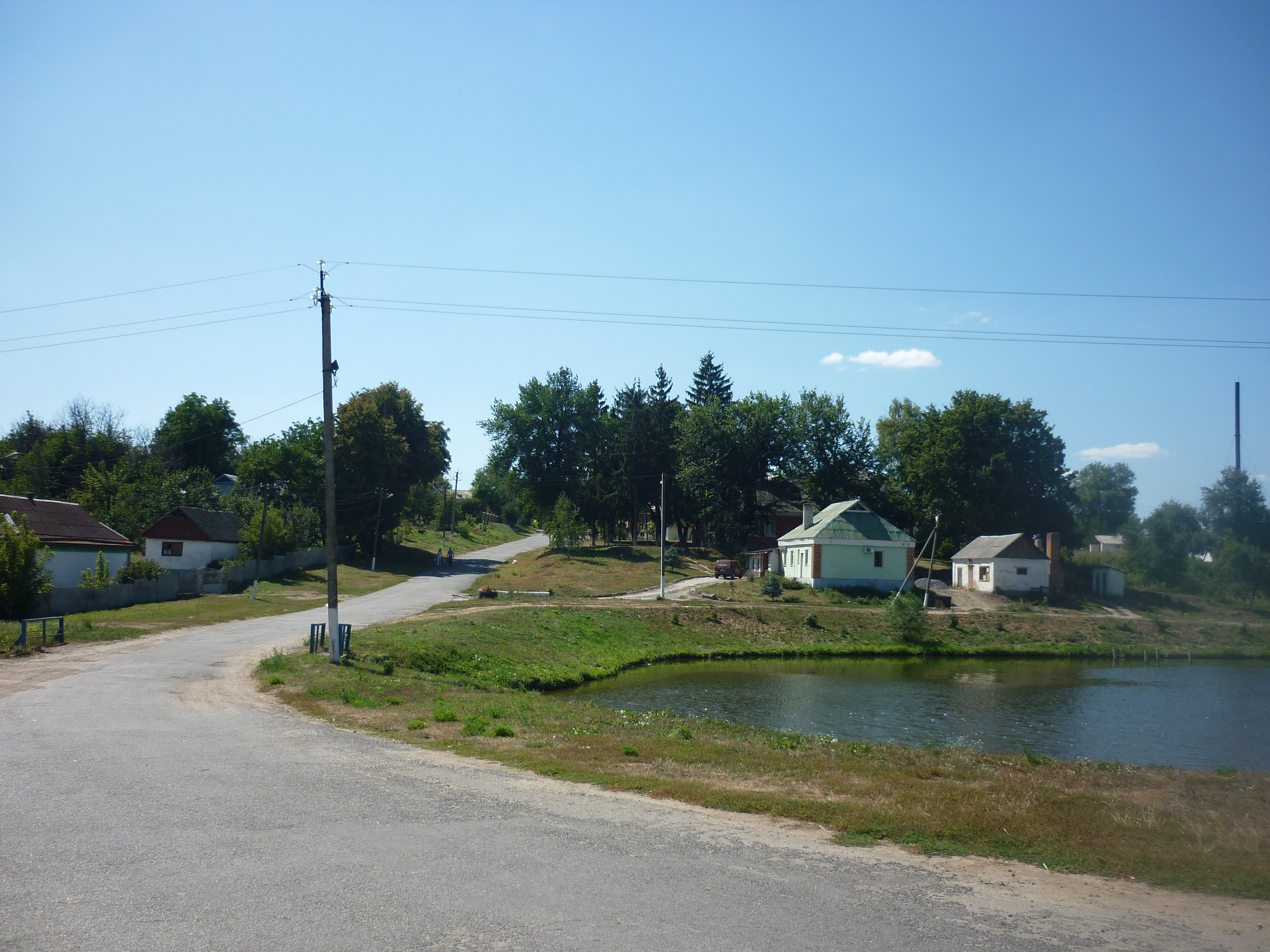 Село Полянецьке Уманського району. Центральна частина села